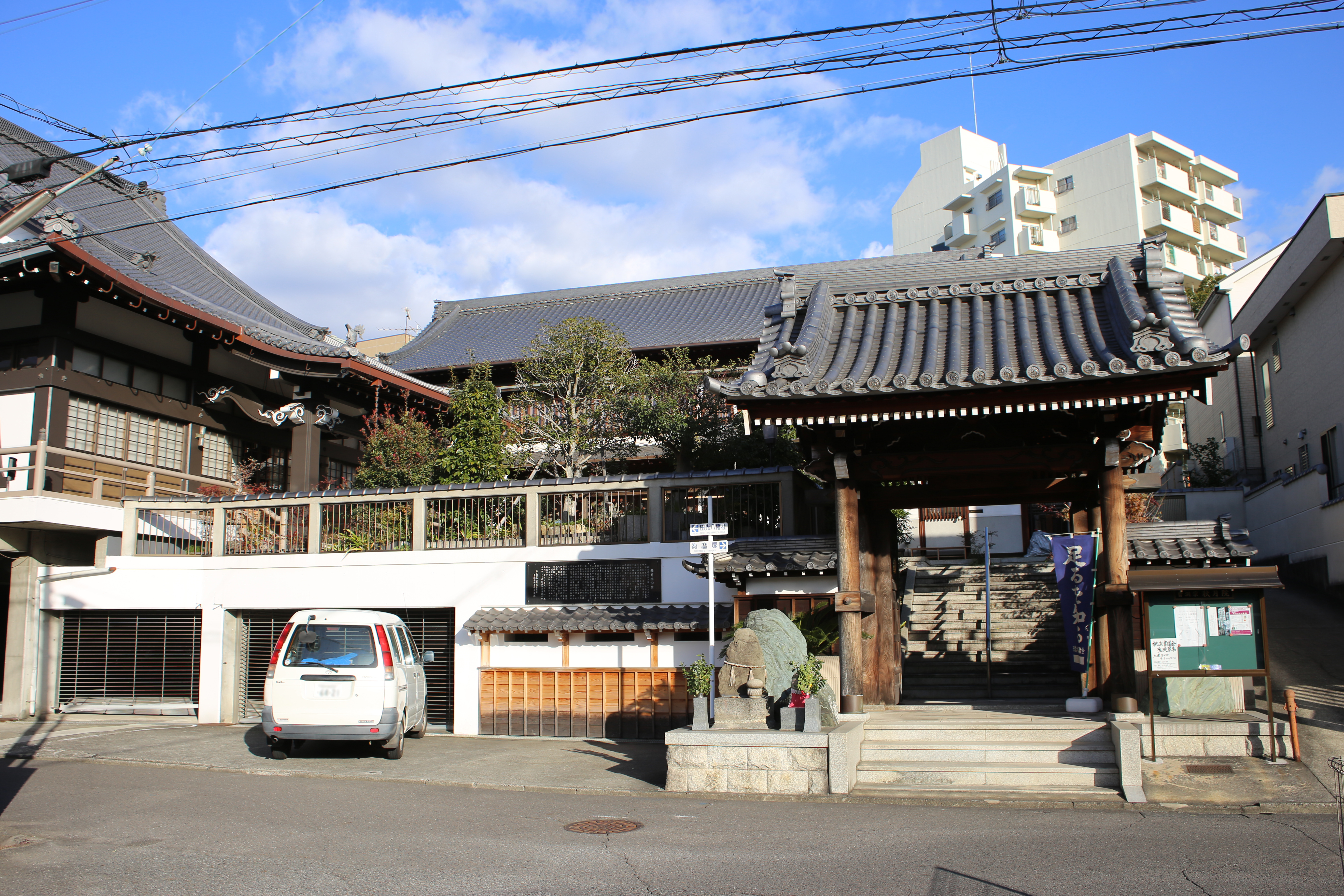 名古屋市瑞穂区大喜町の秋月院